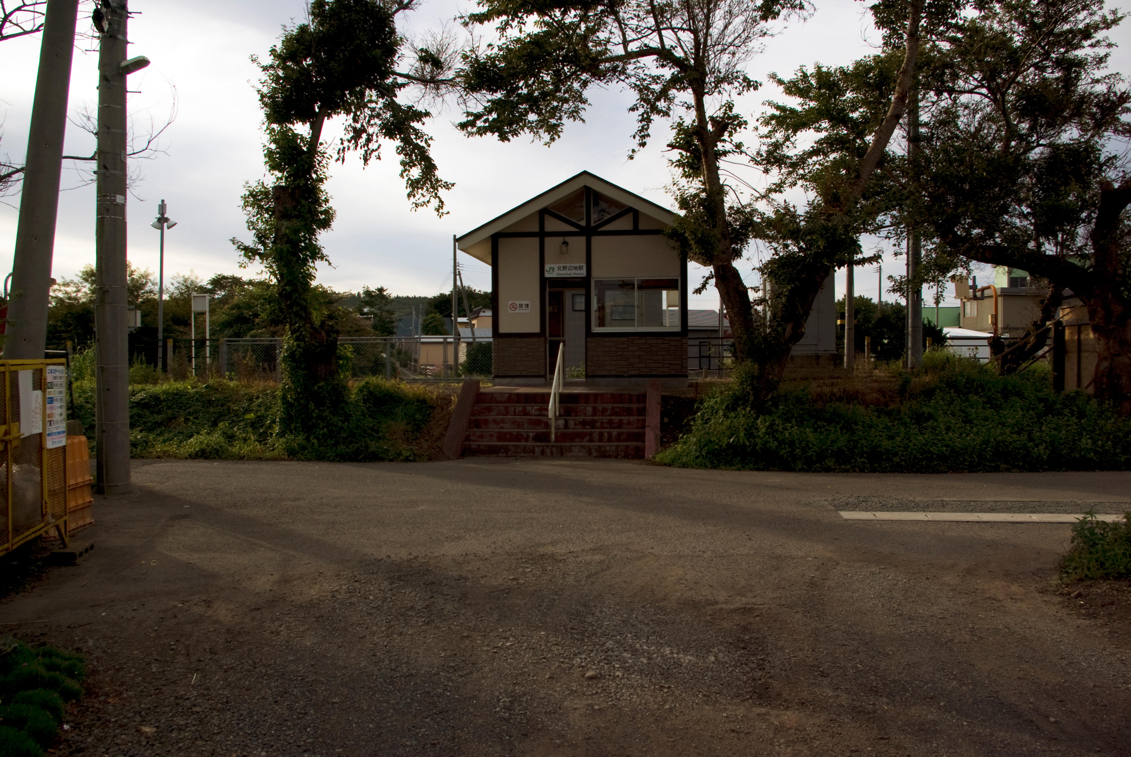 JR大湊線北野辺地駅